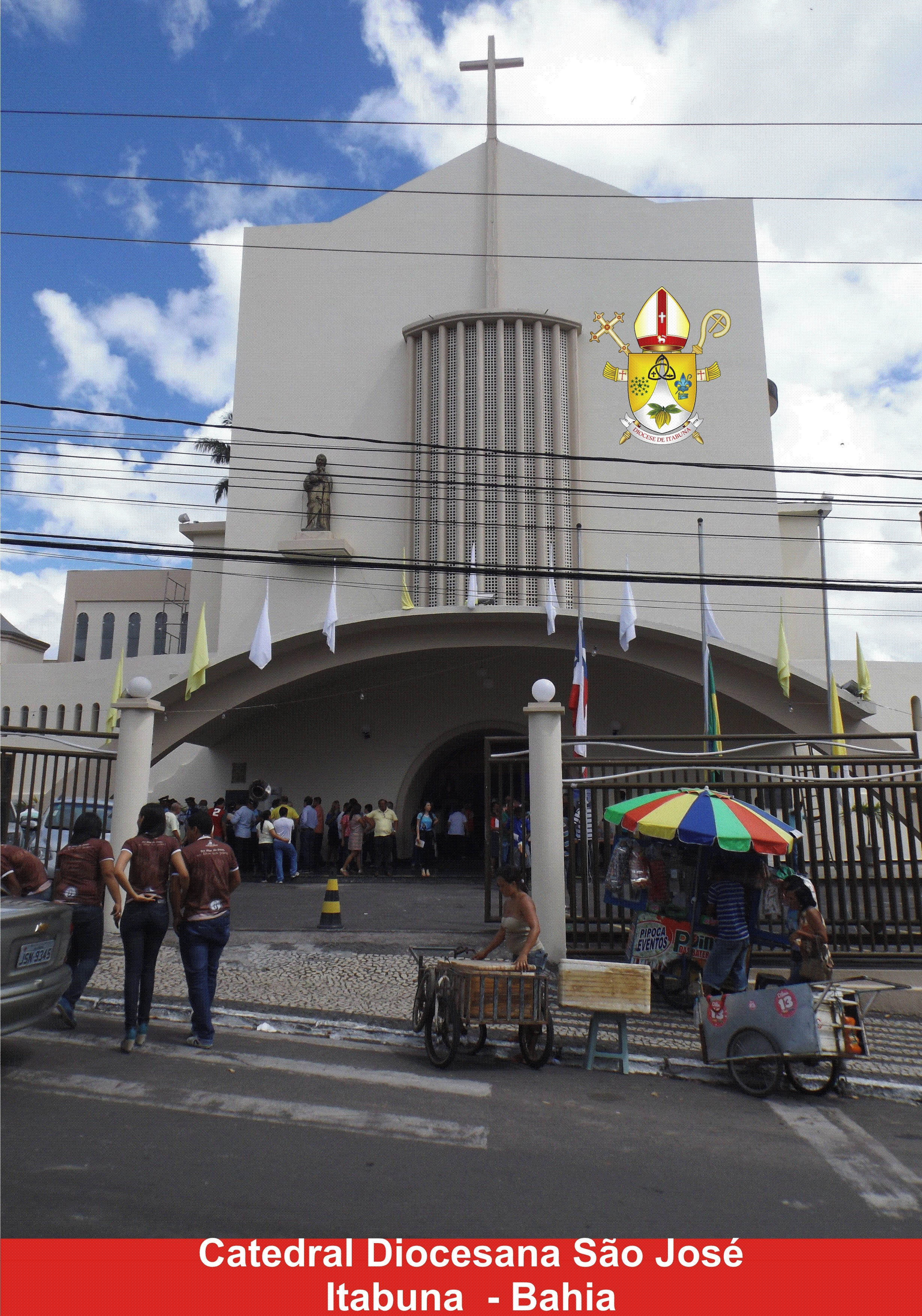 Catedral Diocesana São José - Itabuna, Bahia